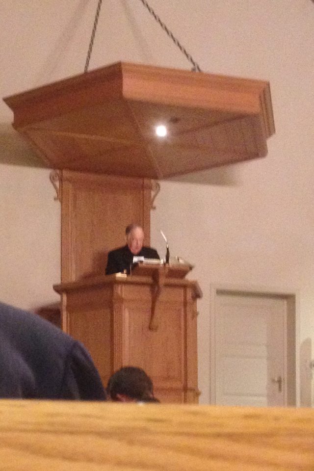 J. B. Philibert op den kansel in Geldermalsen